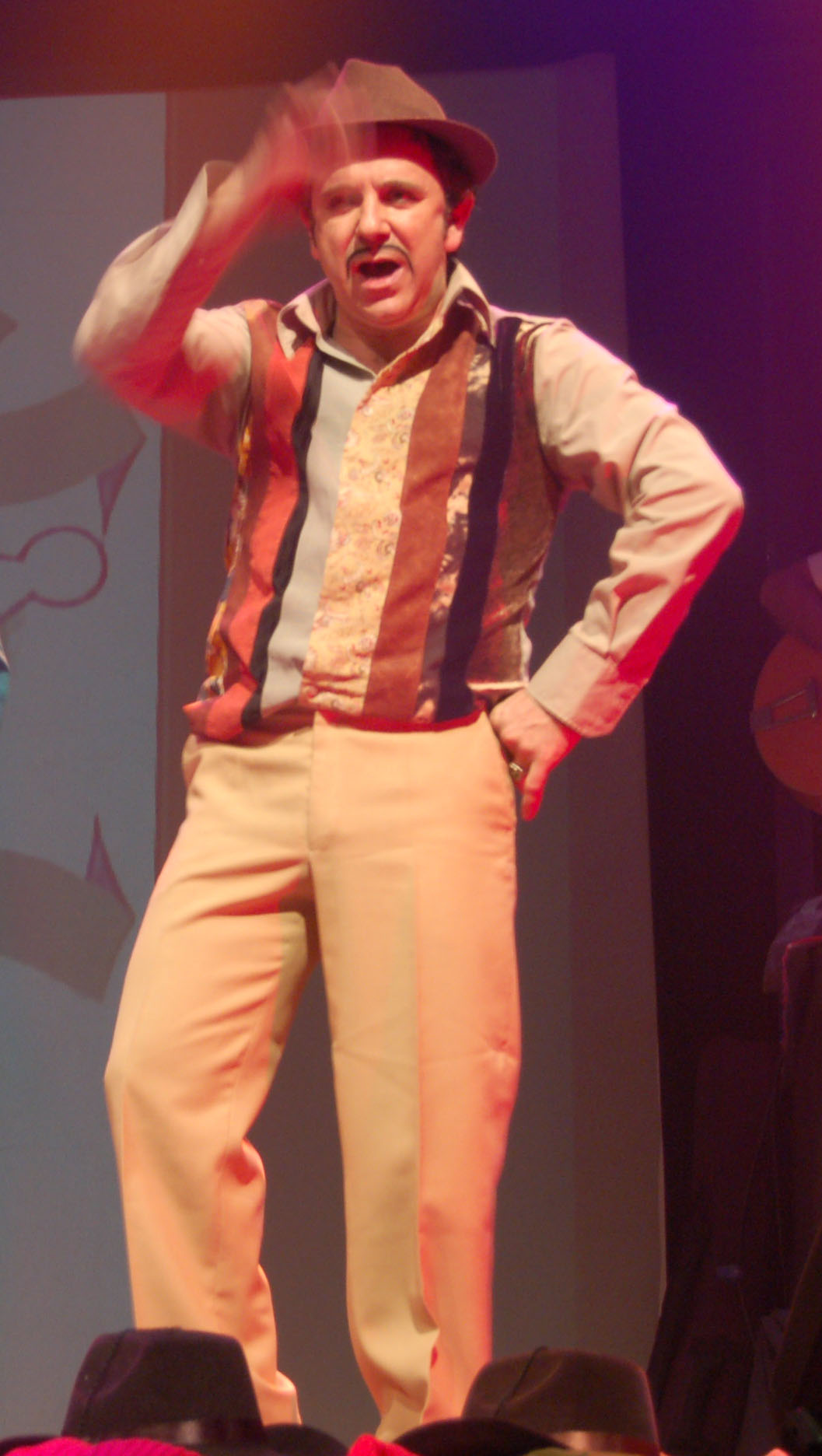 Miguel de Lira nunha homenaxe a John Balan na Sala Nasa de Santiago de Compostela.